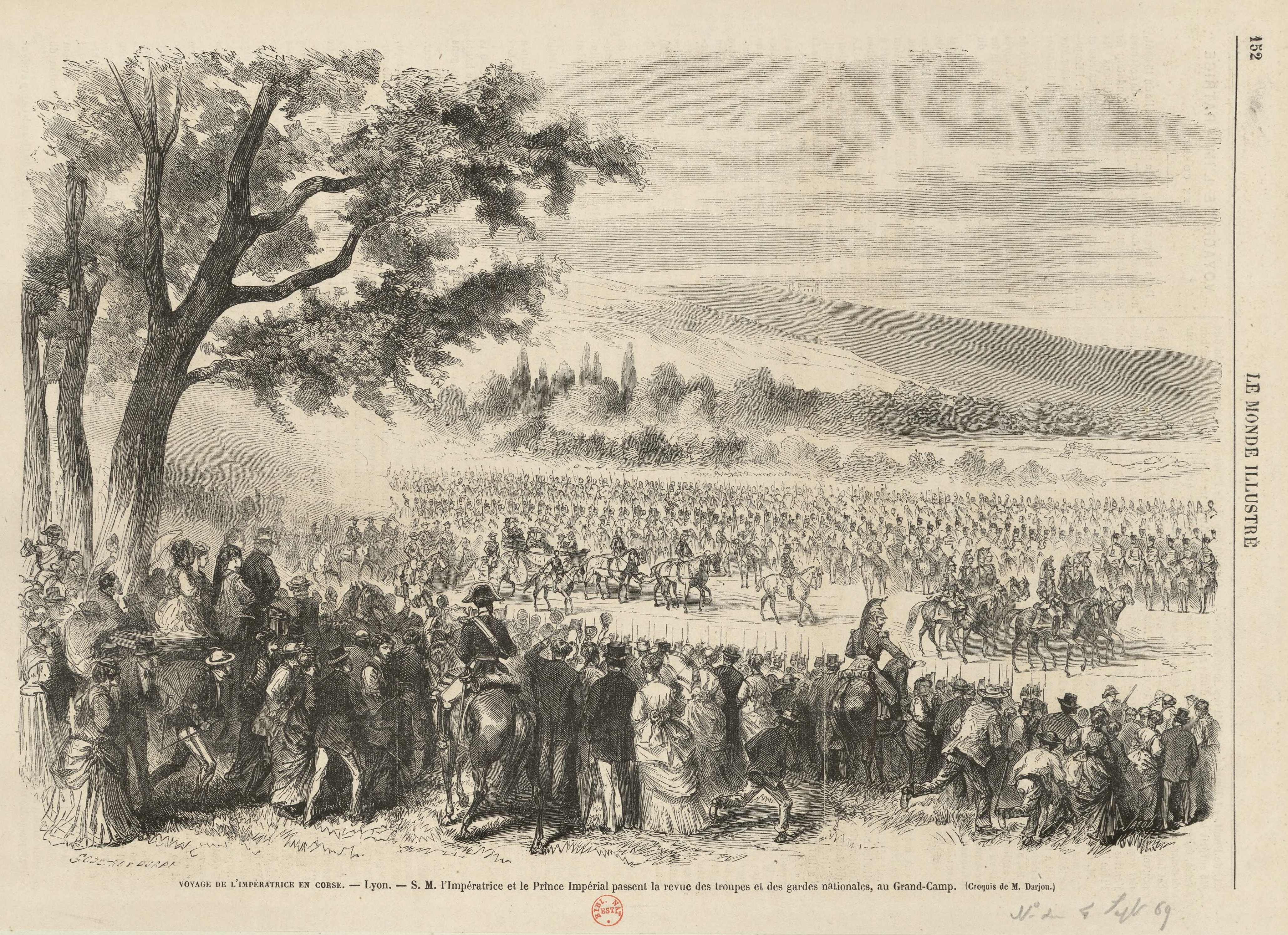 Voyage de l'Impératrice en Corse. - Lyon. S. M. l'Impératrice et le Prince Impérial passent la revue des troupes et des gardes nationales, au Grand-Camp.